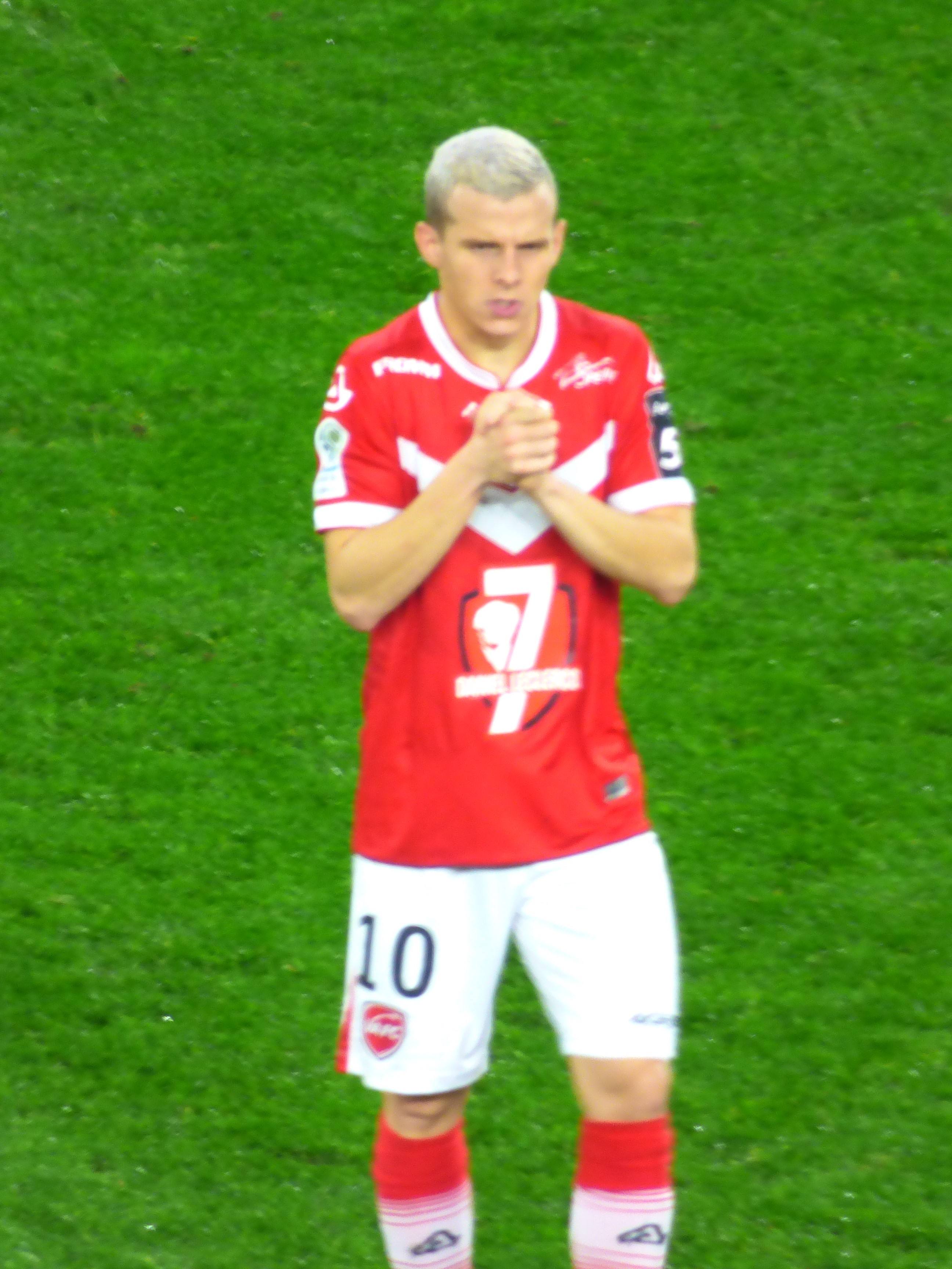 Gauthier Hein pendant le match Valenciennes FC / RC Lens, comptant pour la seizième journée du championnat de France de football de Ligue 2 2019-2020, le 29 novembre 2019.